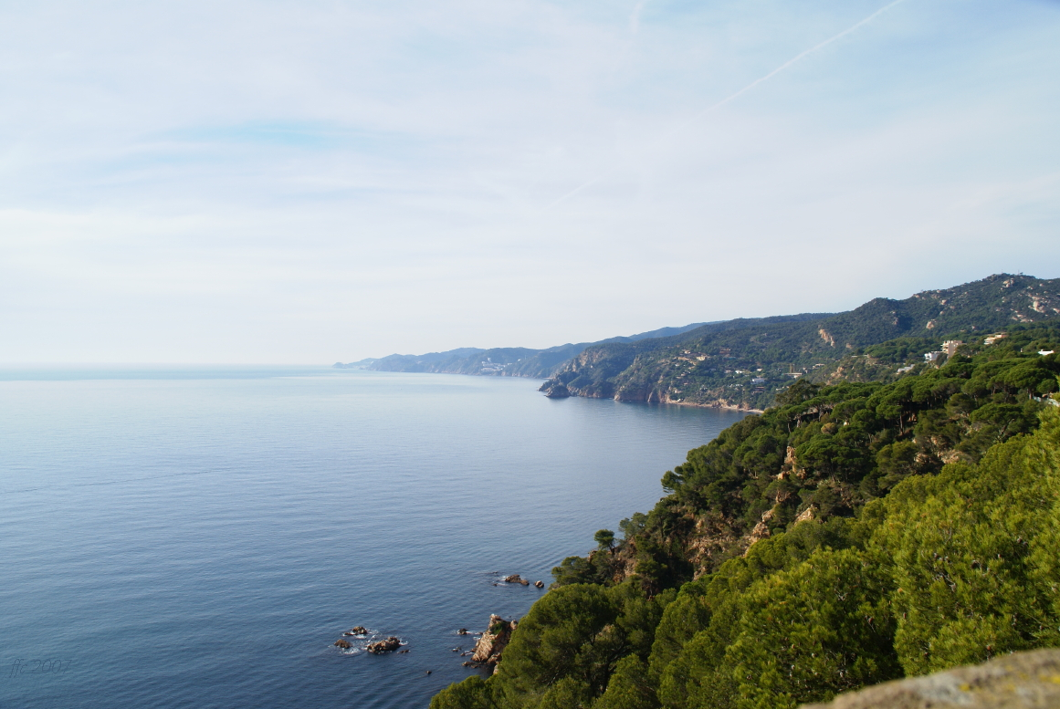 Panorama de la badia de Tossa de Mar des de Sant Elm